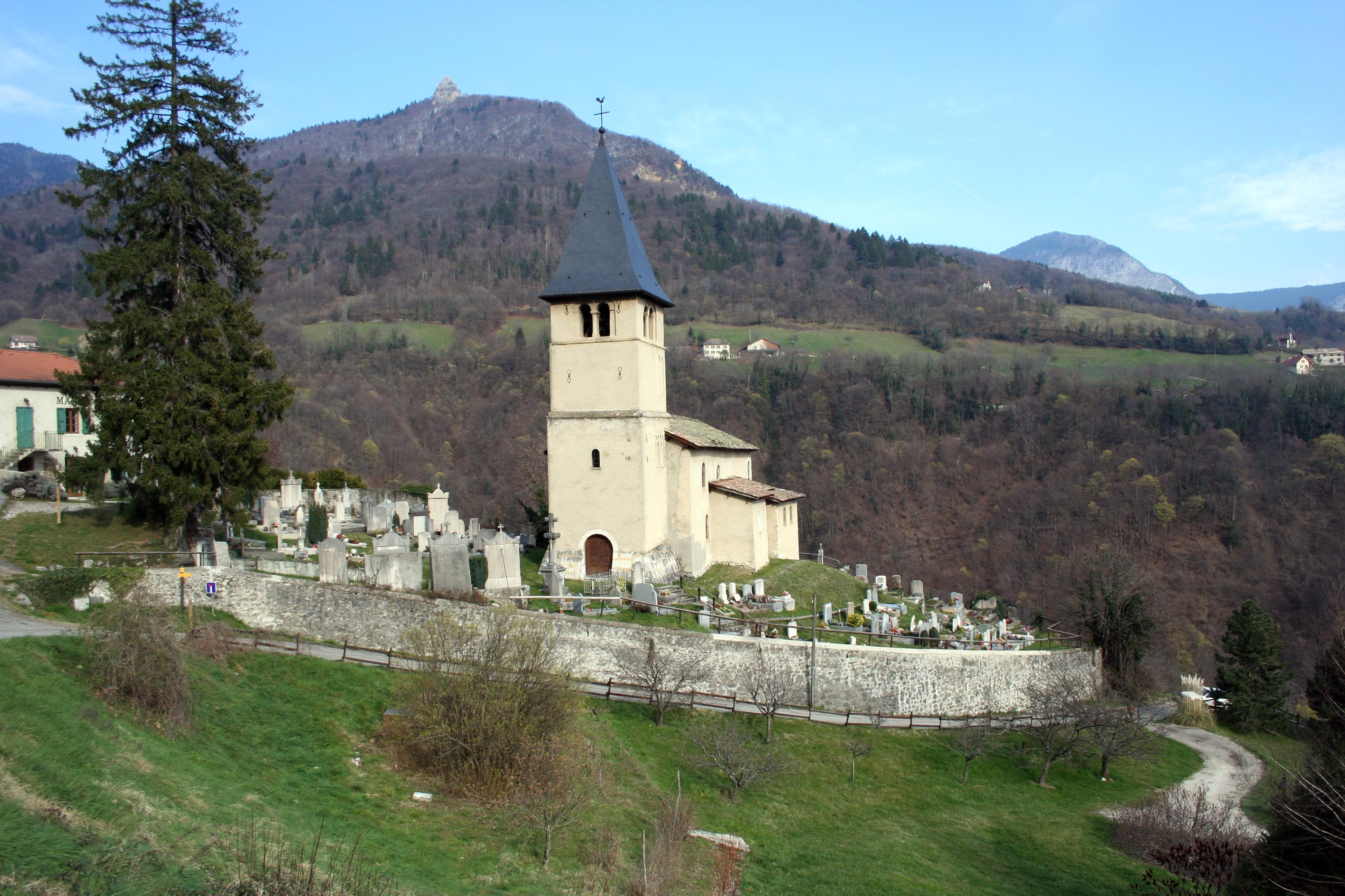 Proveysieux, Isère,l'église. En fond, l'aiguille de Quaix.